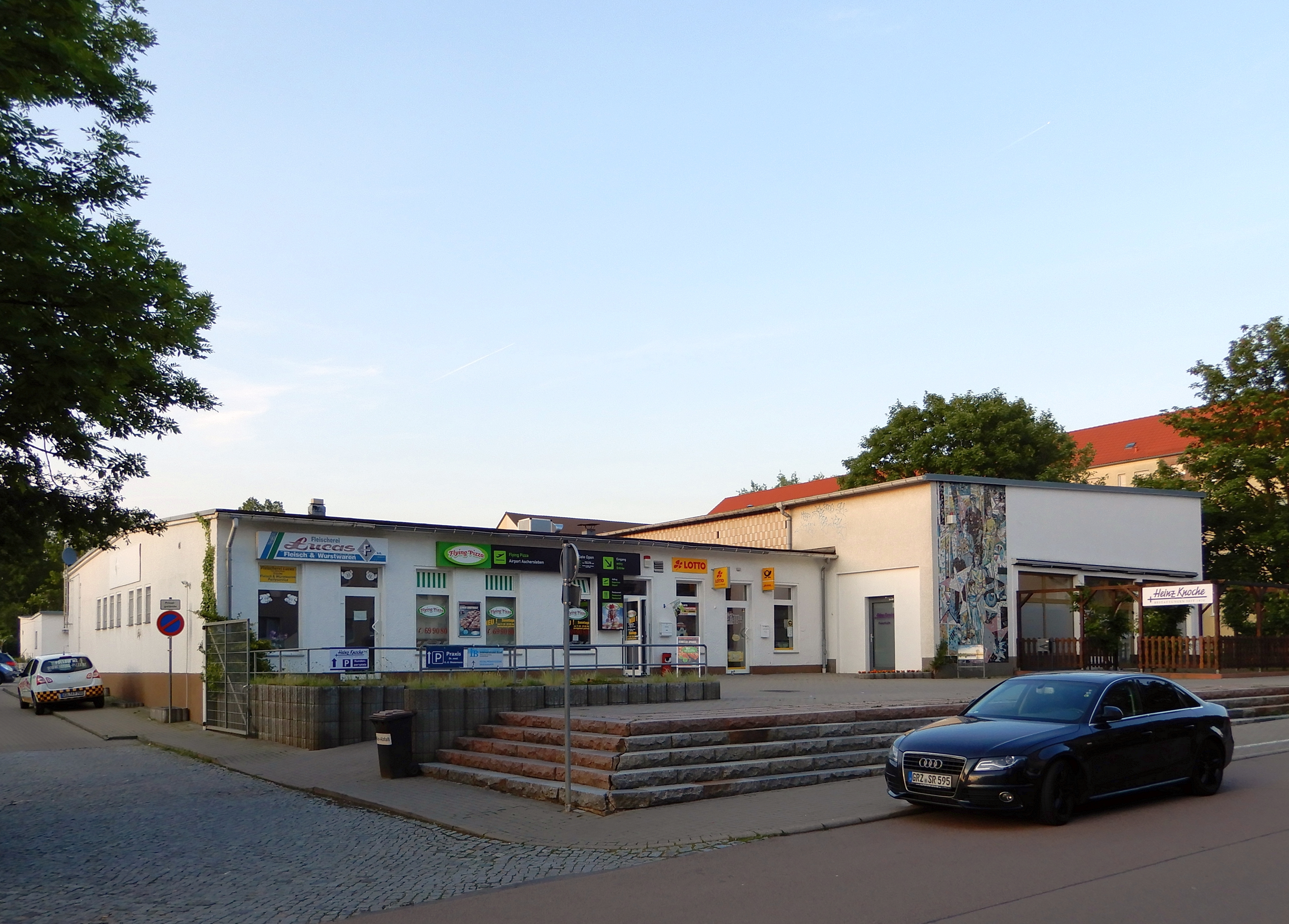 Einkaufszentrum in der Oberstraße 50 in Aschersleben